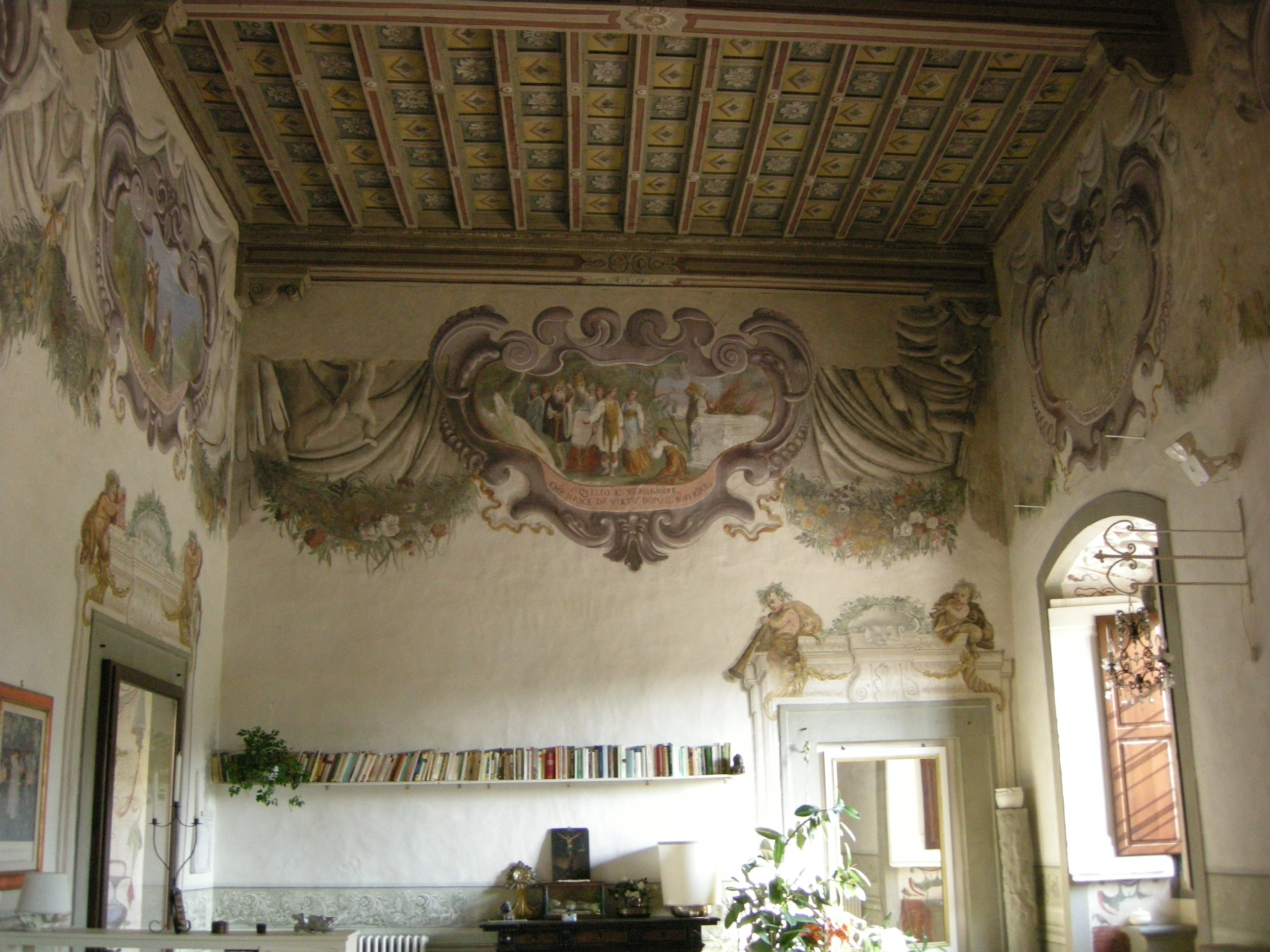 Castello di torregalli, salone con affreschi di baccio del bianco